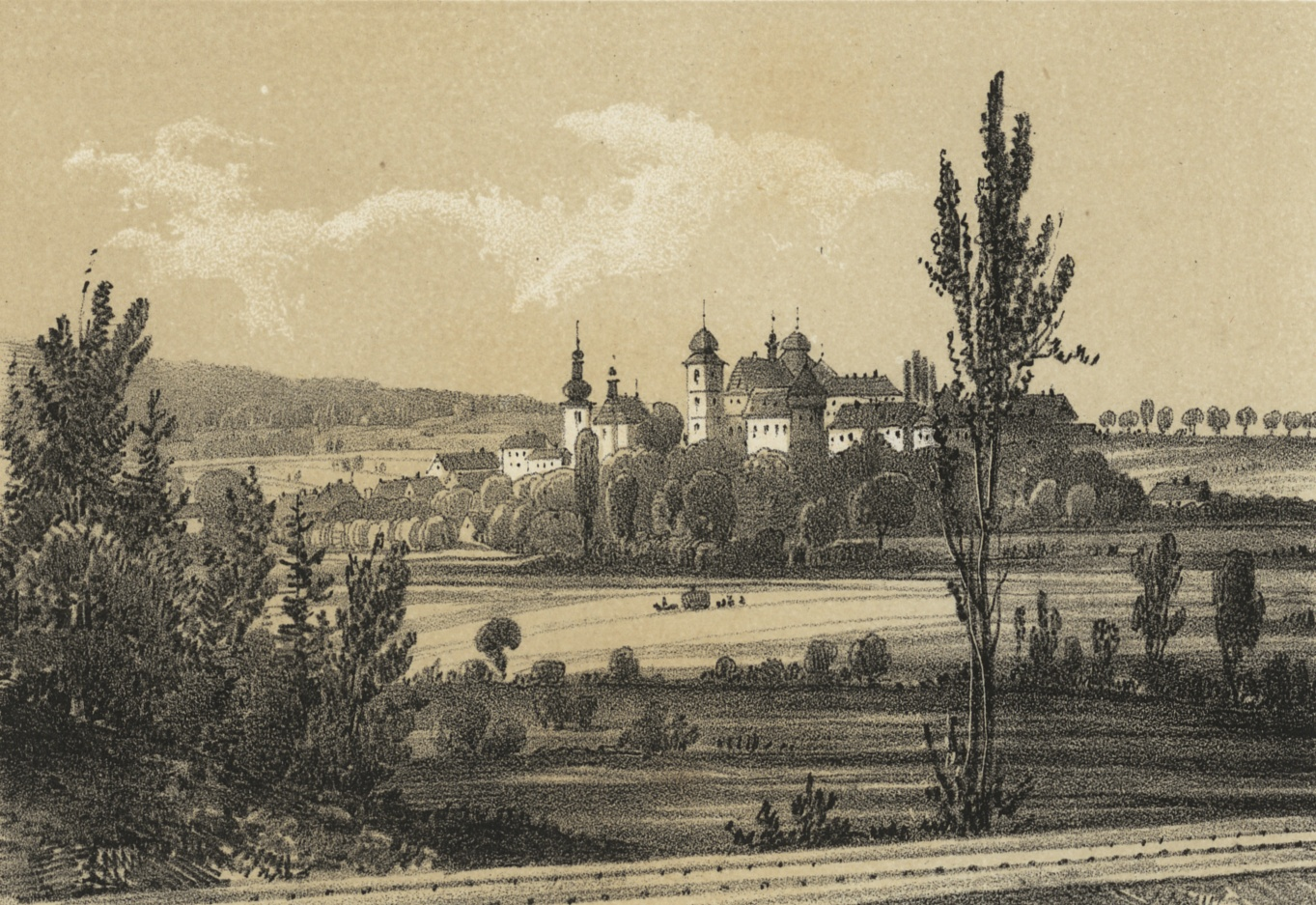 Zámrsk